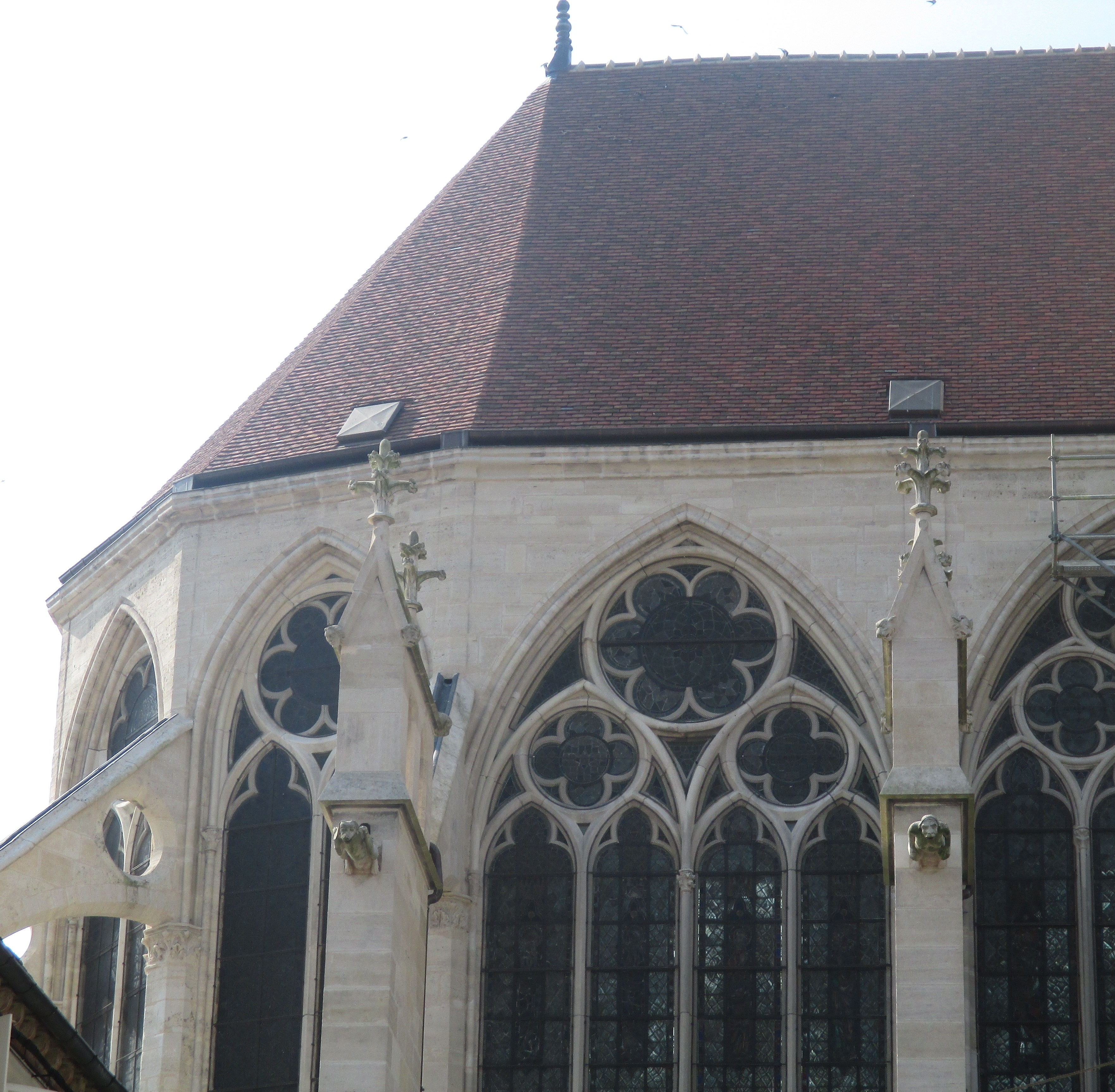 Église Notre-Dame-de-l'Assomption de Villeneuve-sur-Yonne